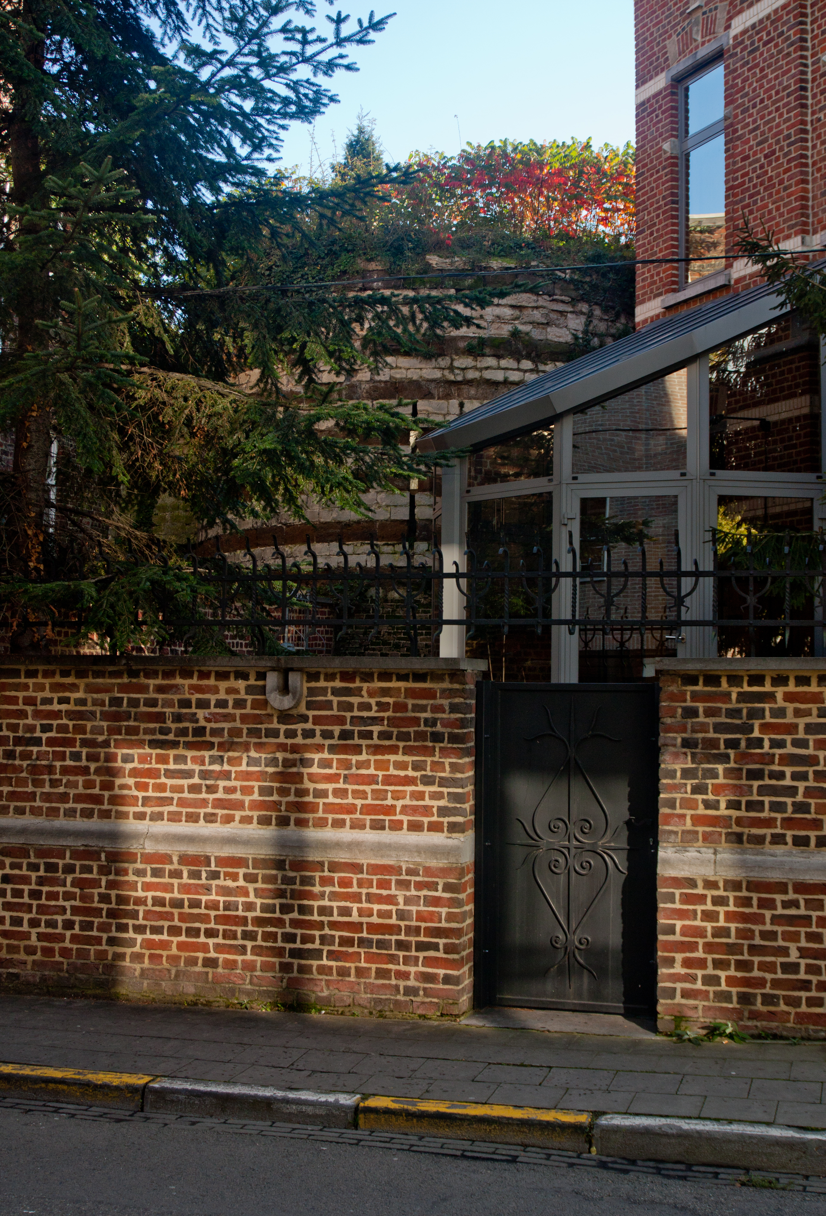 Eerste Stadsomwalling, Leuven